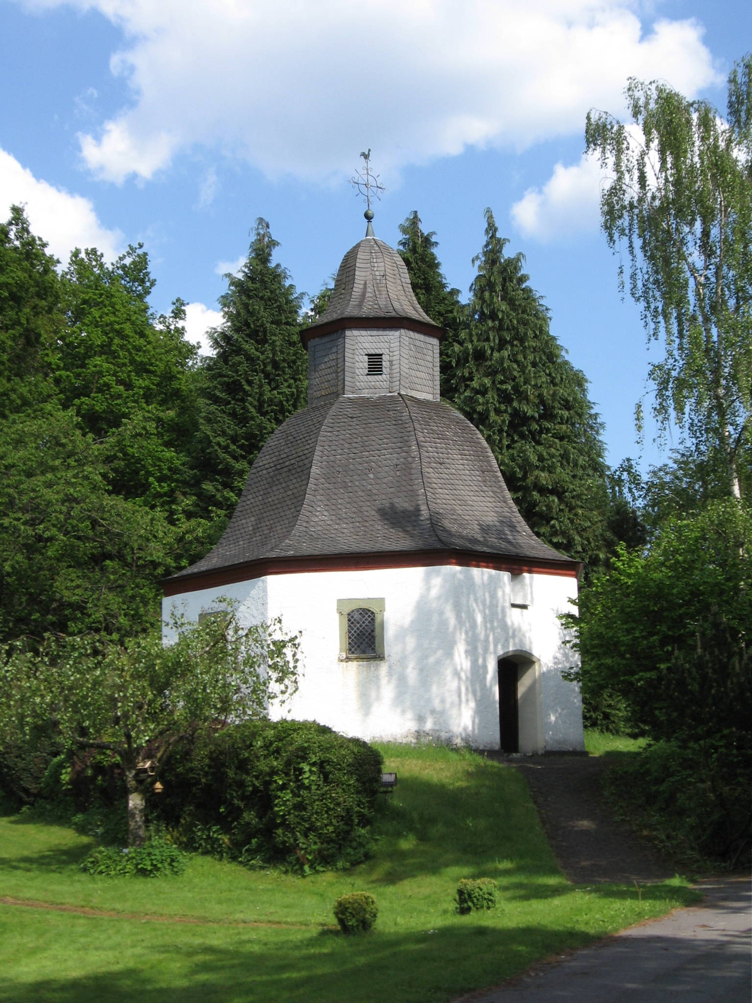 Vierzehn Nothelfer Kapelle in Meschede-Remblinghausen im Sauerland.